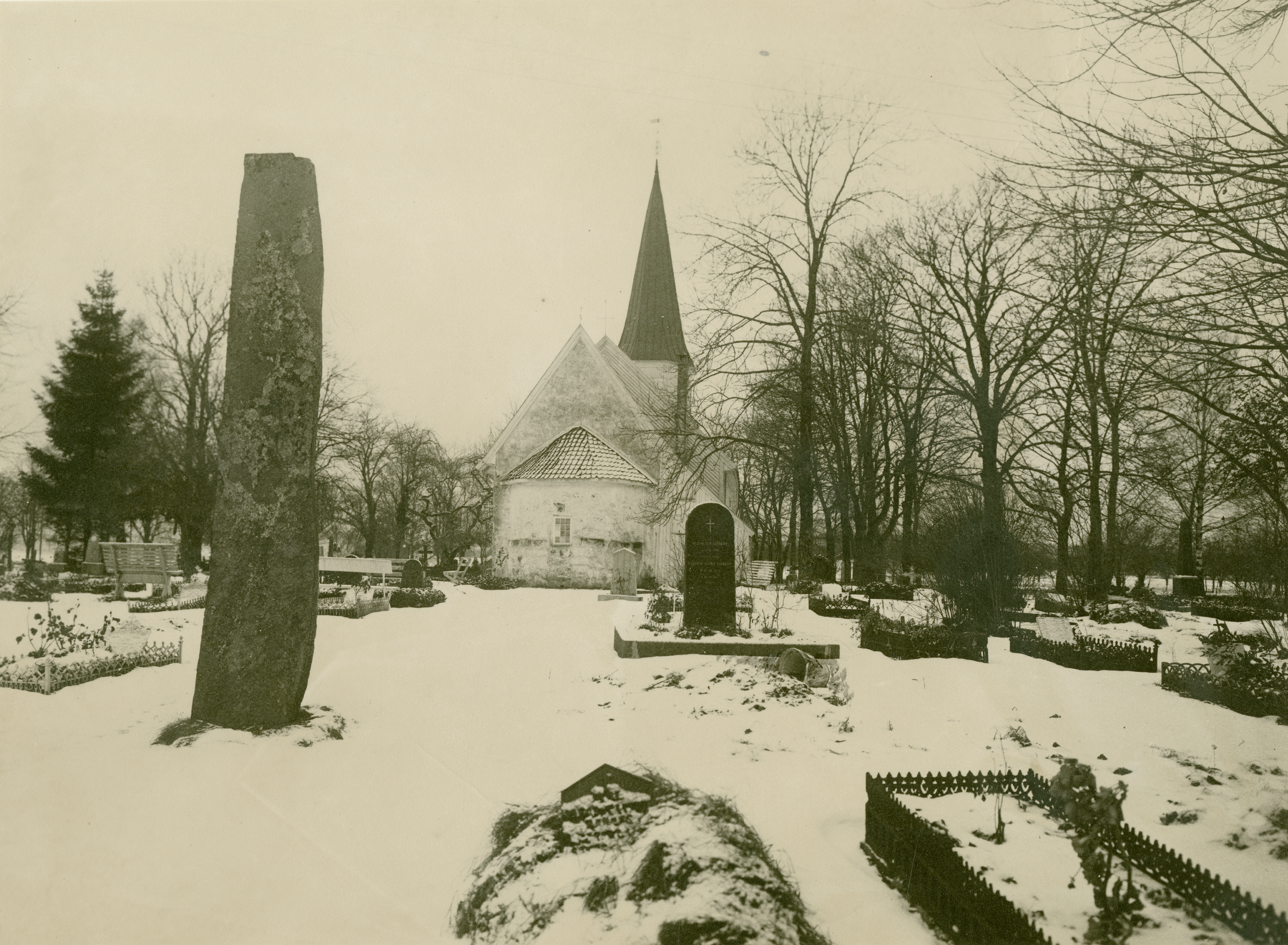 Oddernes kirke i Oddernes, Vest-Agder